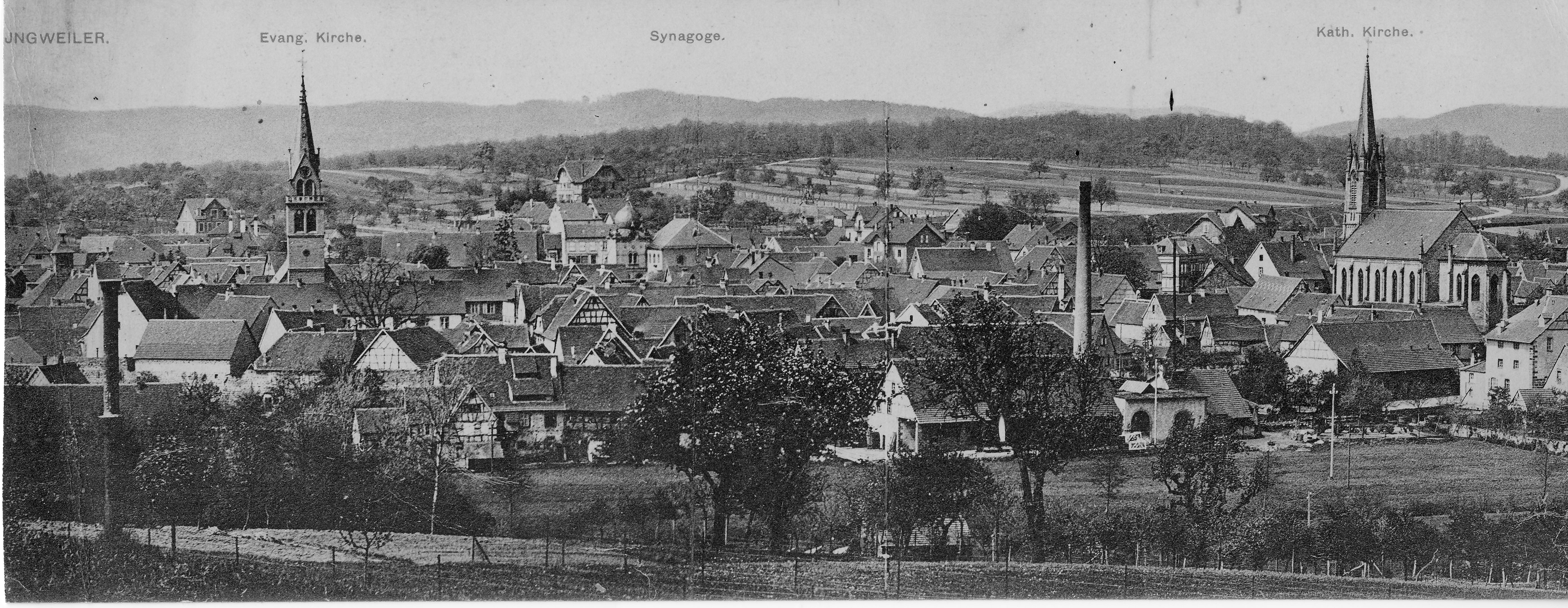 Panorama Ingwiller Alsace (Deutsch-Elsass)